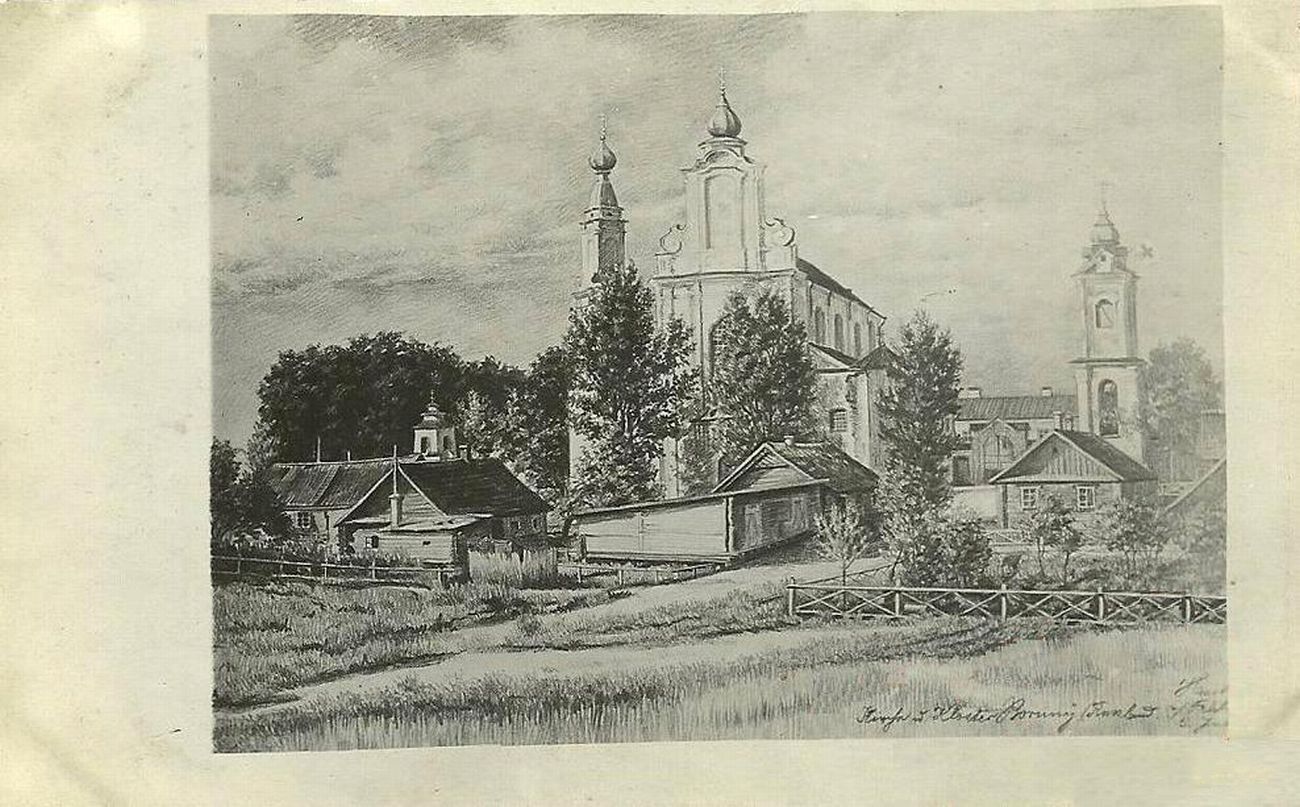 Беларуская (тарашкевіца): Баруны (Baruny), пляц Рынак (plac Rynak). Царква Сьвятых Апосталаў Пятра і Паўла і манастыр базылянаў